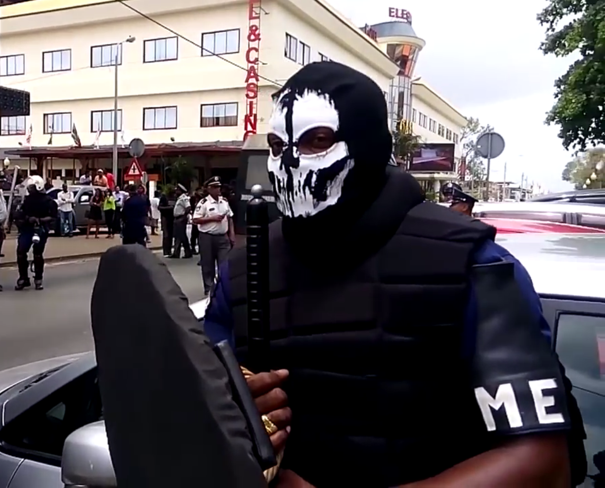 Mobiele Eenheid Paramaribo, politieman met masker